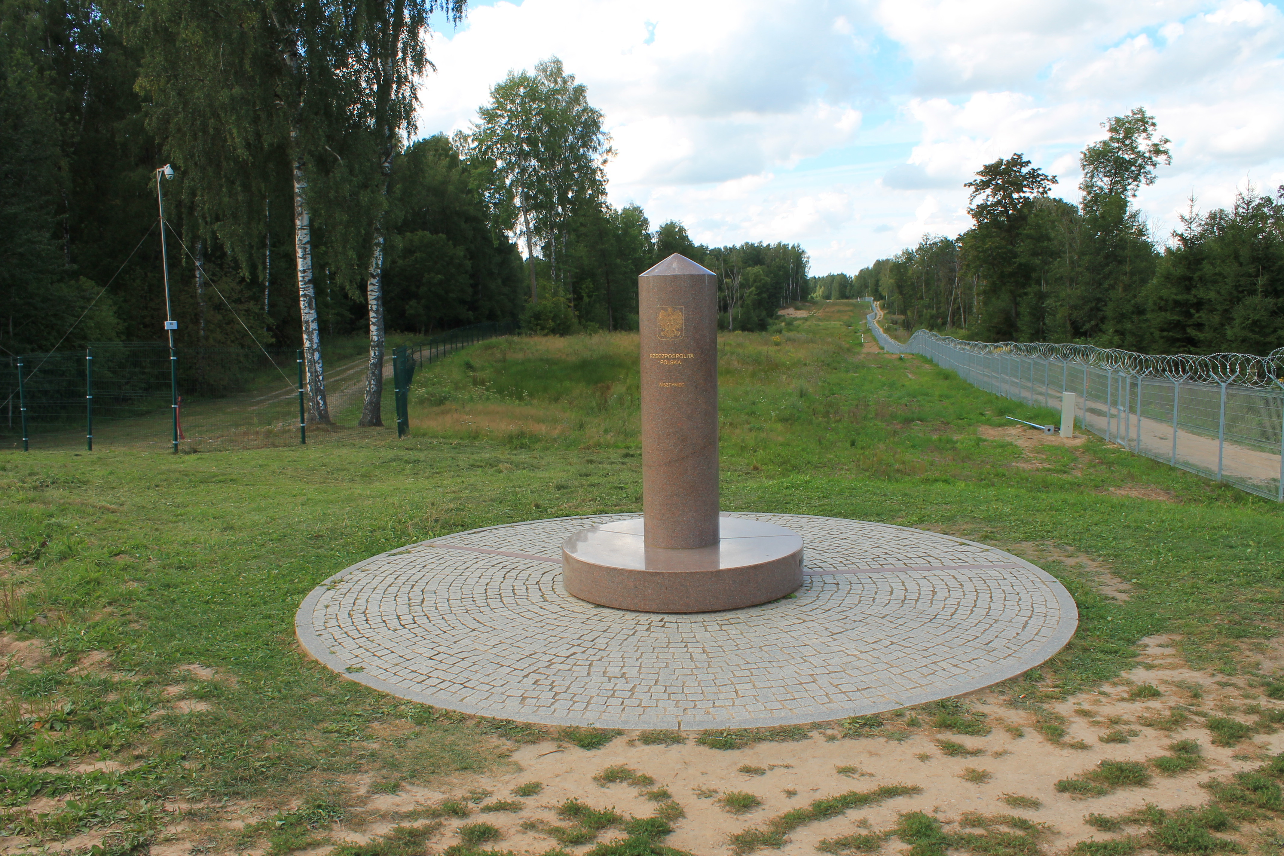 Trójstyk granic Polski, Litwy i Rosji z oddali. Marmurowy obelisk i linie poziome informujące o poszczególnych terytoriach.